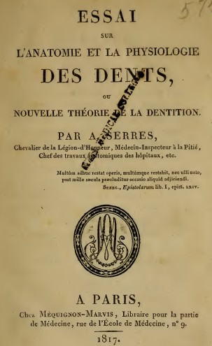 Étienne Serres (1786-1868): Essai sur l'anatomie et la physiologie des dents, ou, Nouvelle théorie de la dentition